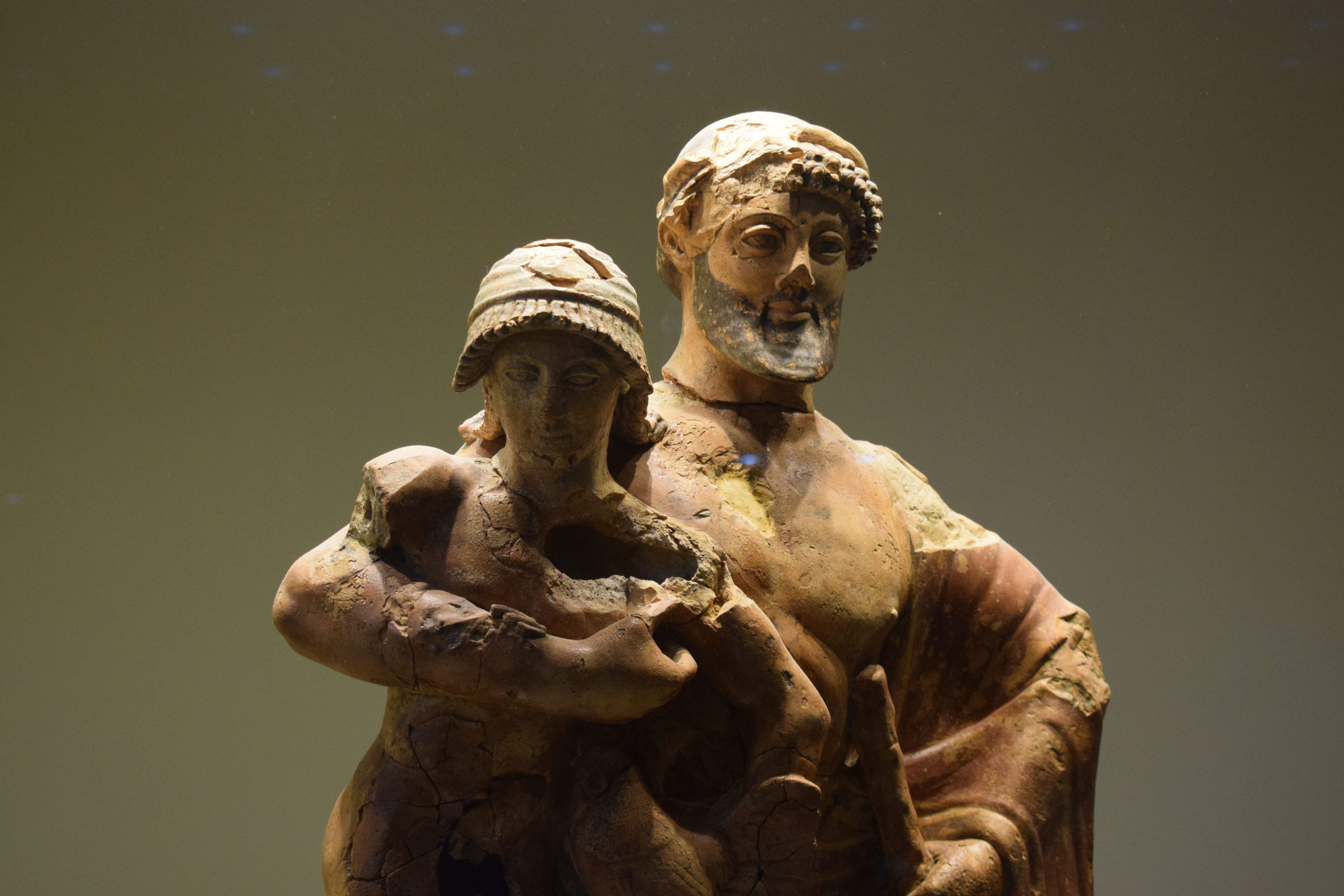 Vue du musée archéologique d'Olympie en Grèce.